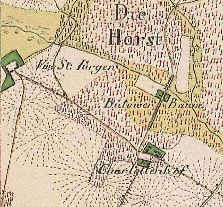 St. Jürgen, Charlottenhof und Buchenhaus, Gemeinde Märkisch Linden, Lkr. Ostprignitz-Ruppin, Brandenburg, Ausschnitt aus dem Urmesstischblatt 3042 Neuruppin von 1825